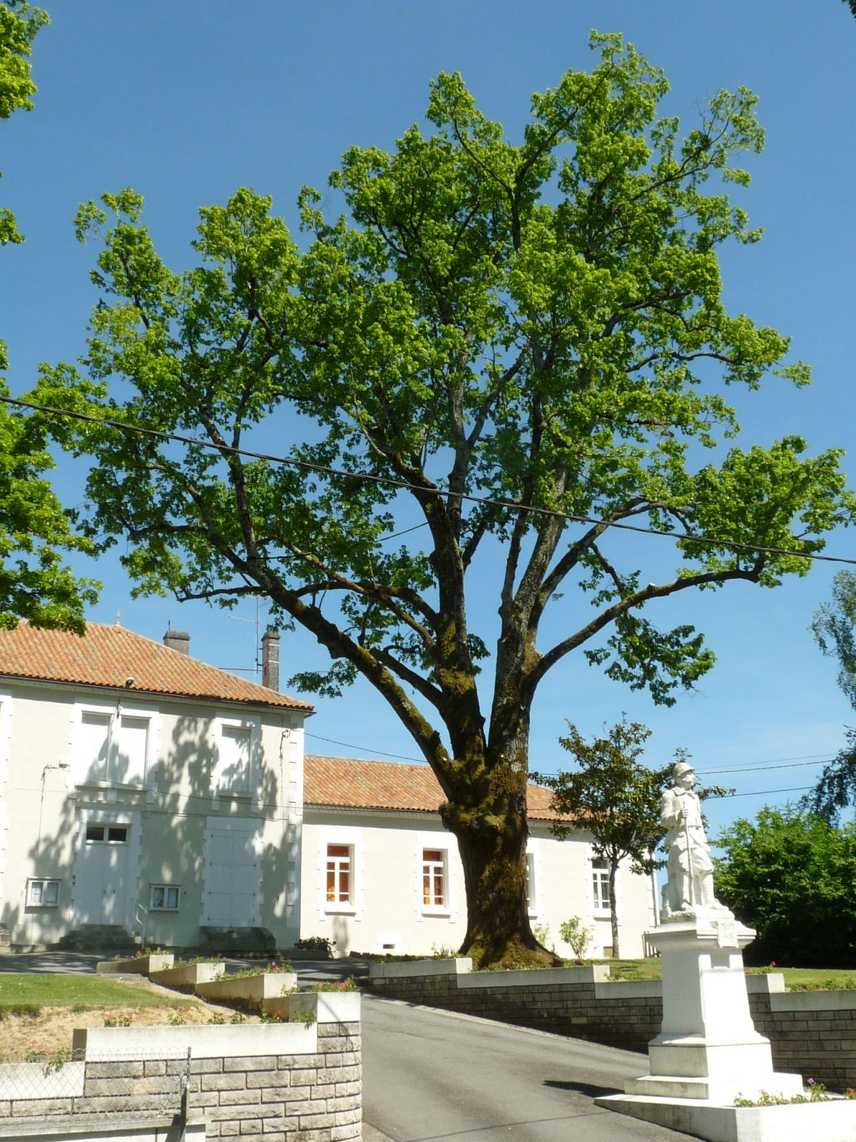 gros tilleul devant la mairie de Roussines, Charente, France